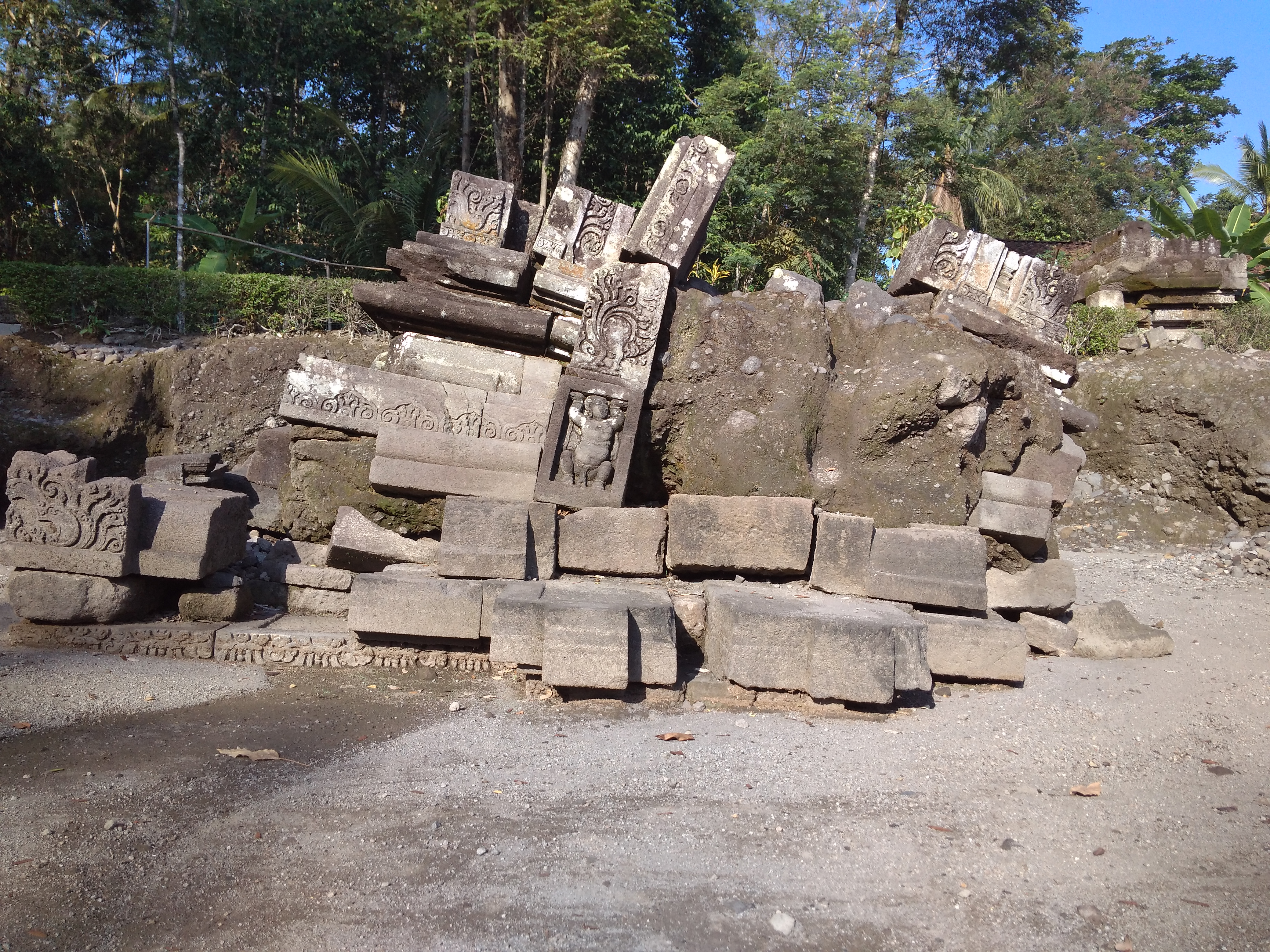 Candi Morangan